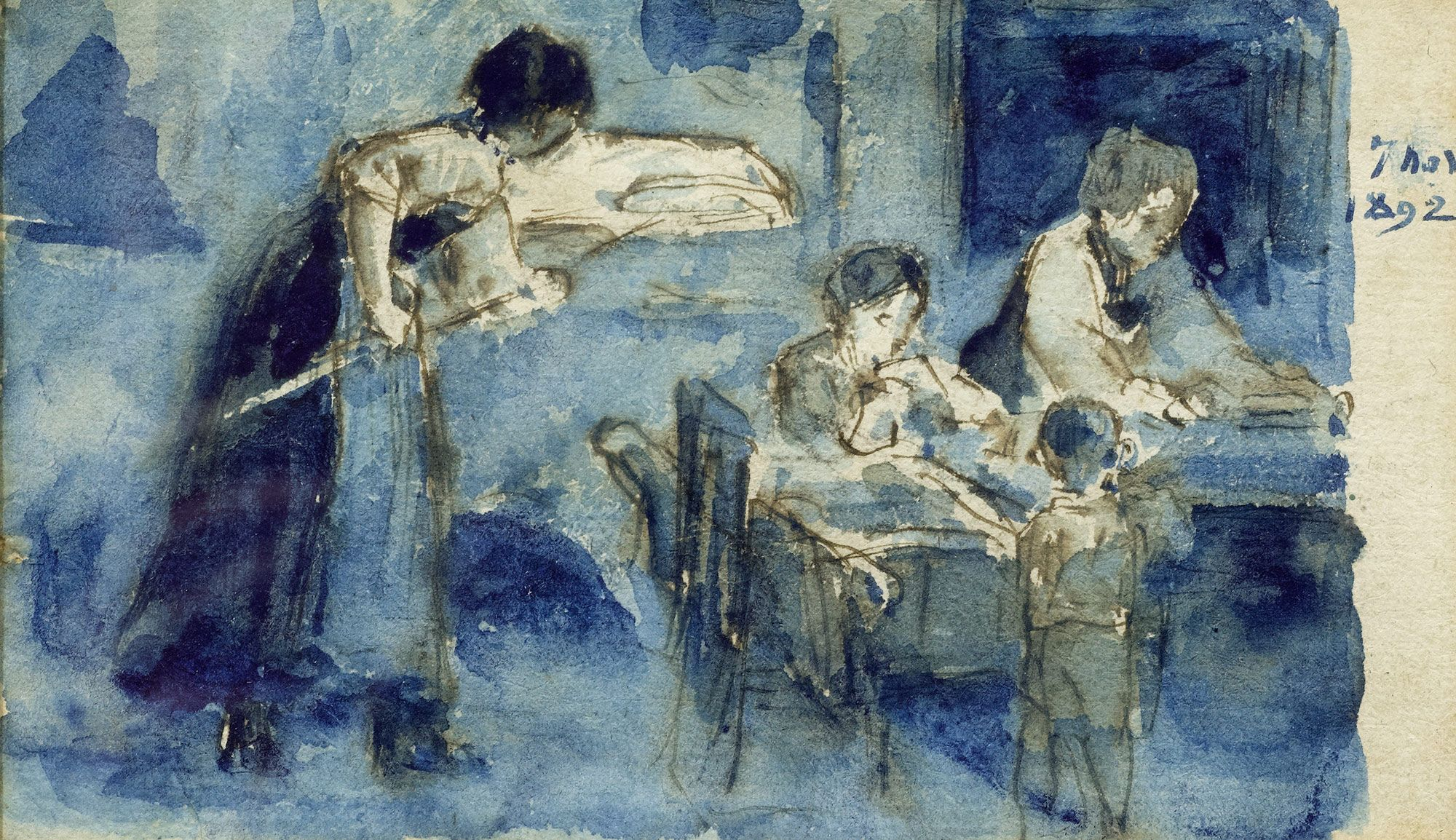 Küchenszene. 1892. Aquarell und Bleistift auf Papier. Oben rechts datiert: 7 nov 1892. 8,2 x 14 cm (Lichtmass).